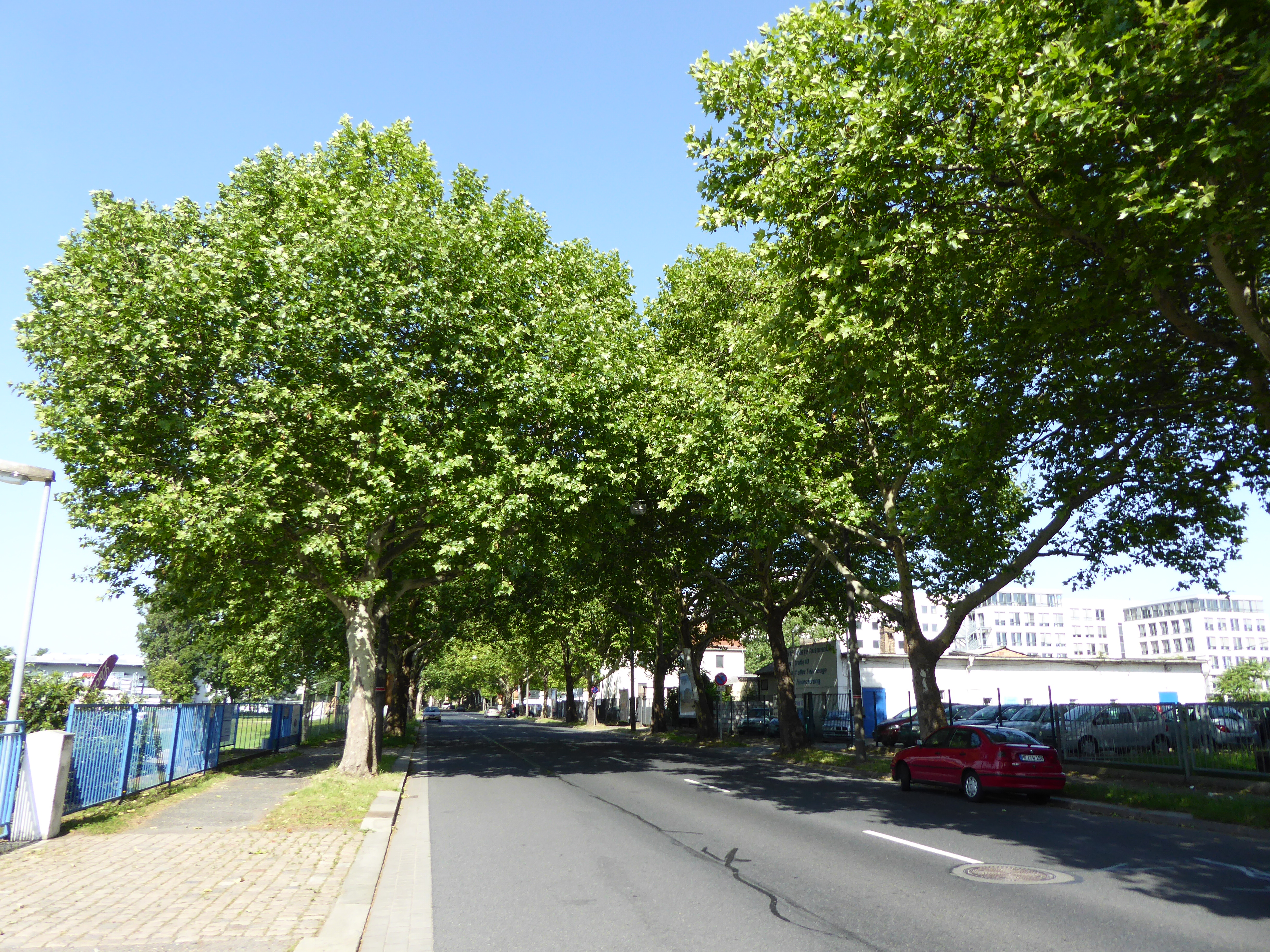 Naturdenkmal „Platanen-Allee Bremer Straße“ in Dresden; Naturdenkmal wegen der besonderen stadtgestalterischen Wirkung inmitten des beidseitigen Industrie- und Gewerbegebietes Bremer Straße; Platanus x hispanica Münchh.